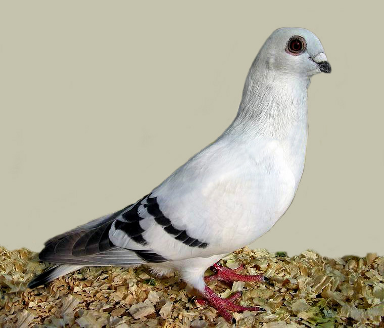 Damascene pigeon